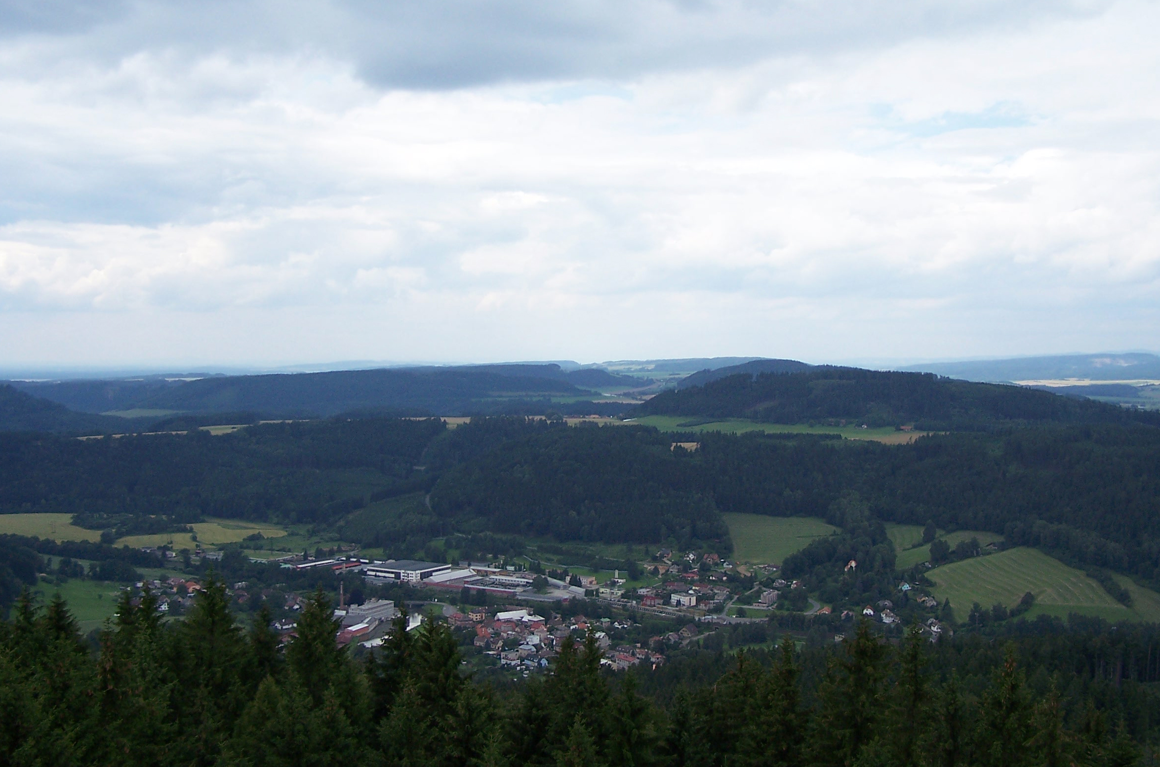 Kerhartice je část města Ústí nad Orlicí. Foto je z rozhledny Andrlův chlum